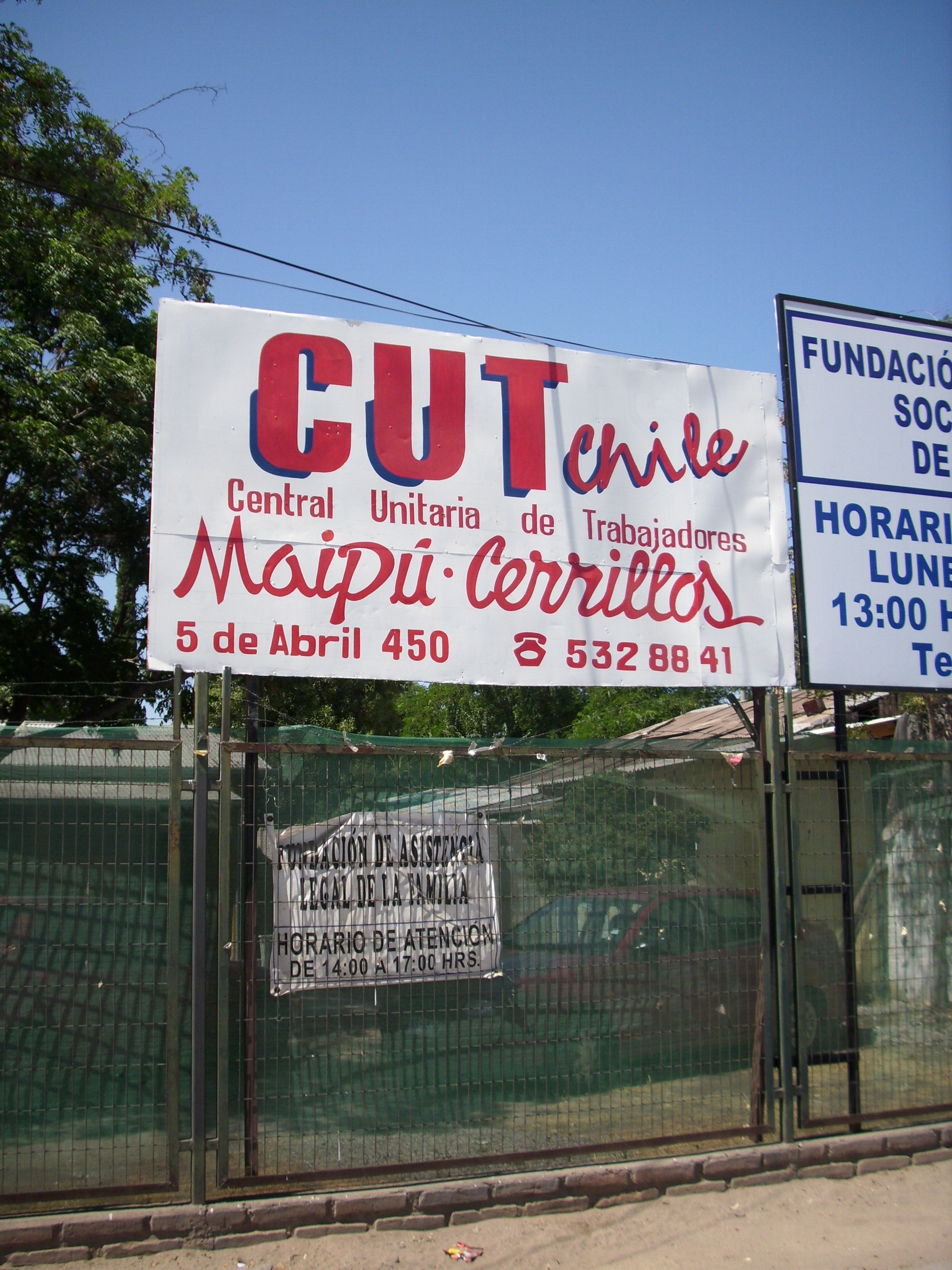 La sede de la Central Unitaria de Trabajadores Maipú-Cerrillos, ubicada en avenida 5 de Abril 406, Maipú, Santiago de Chile.